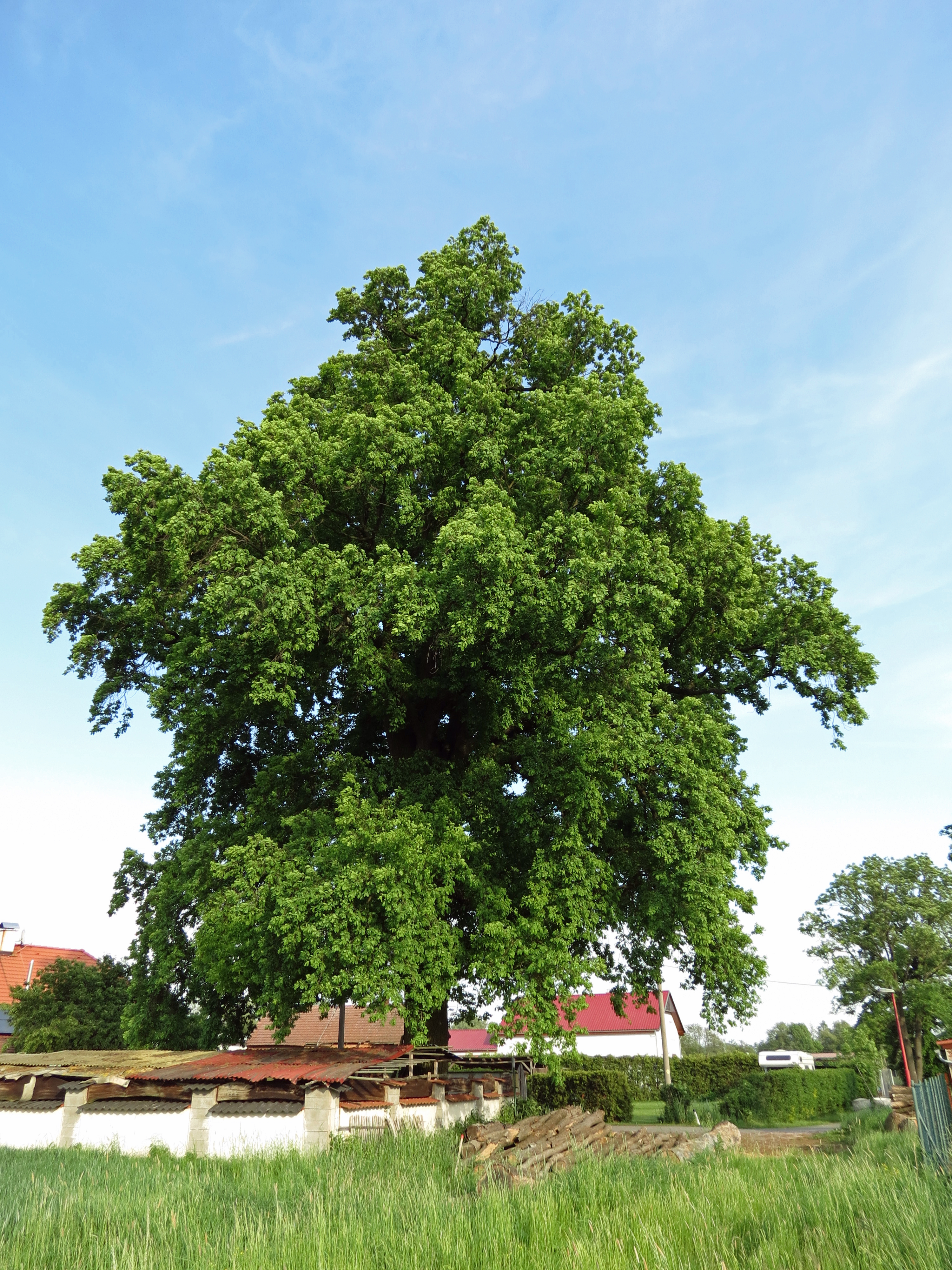 Dohalický dub